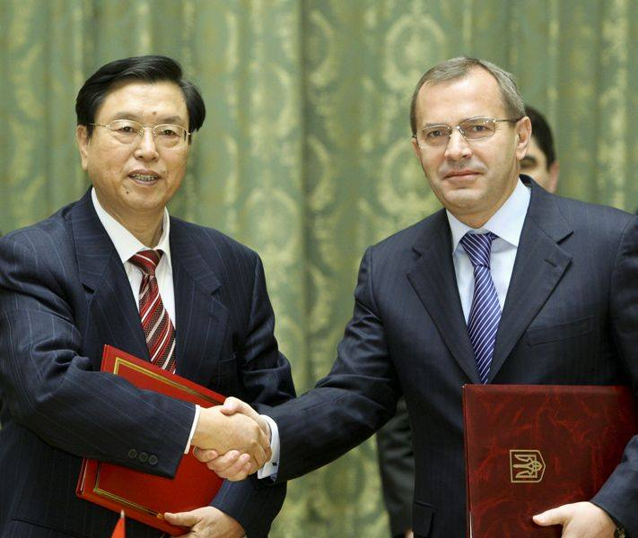 Министр экономического развития и торговли Украины Андрей Клюев и вице-премьер-министр Госсовета КНР Чжан Децзян на подписании соглашения о создании Комиссии по сотрудничеству между Правительством Украины и Правительством Китайской Народной Республики.